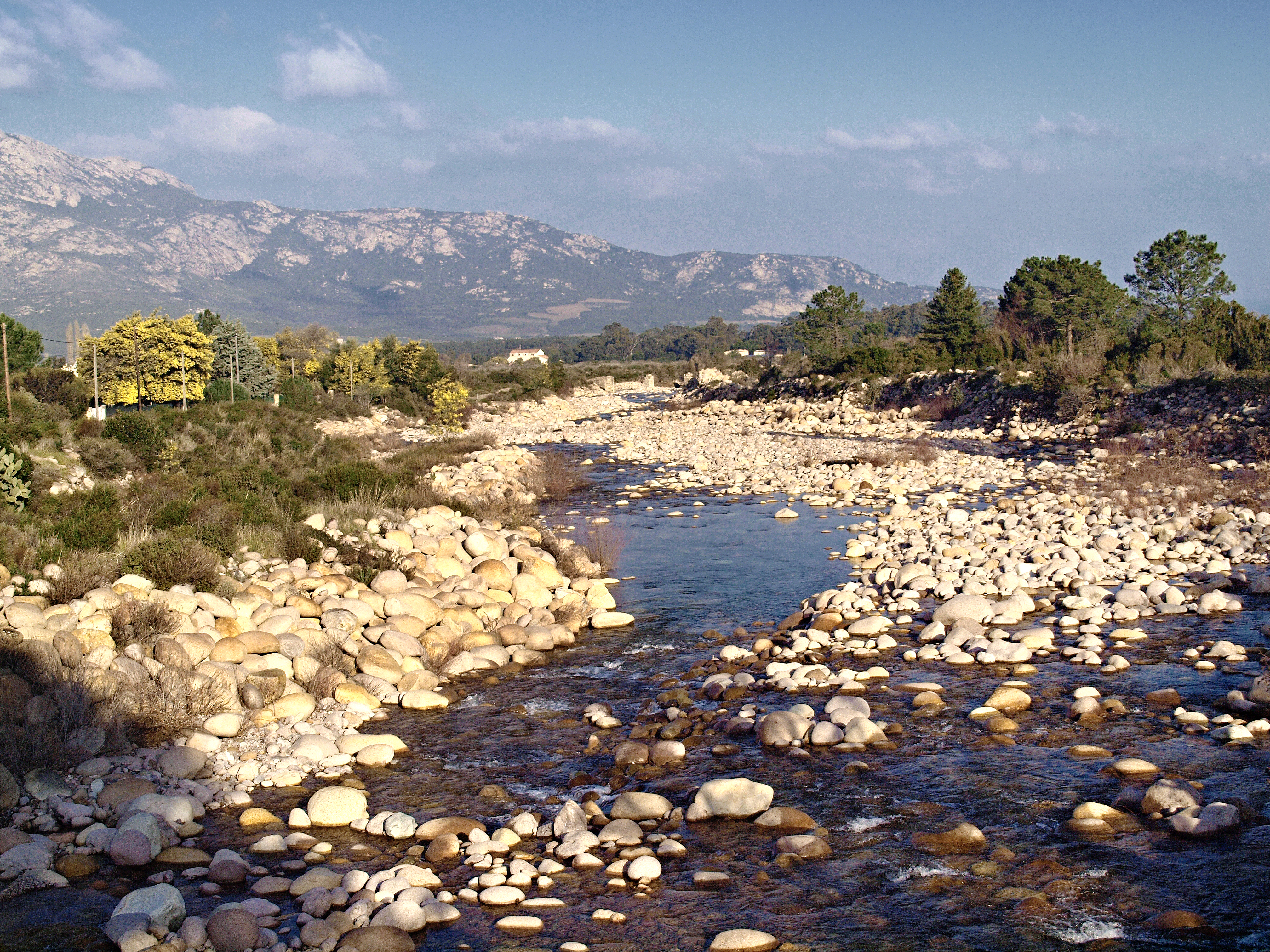 Moncale (Corsica) - La Figarella en aval du pont RD 51